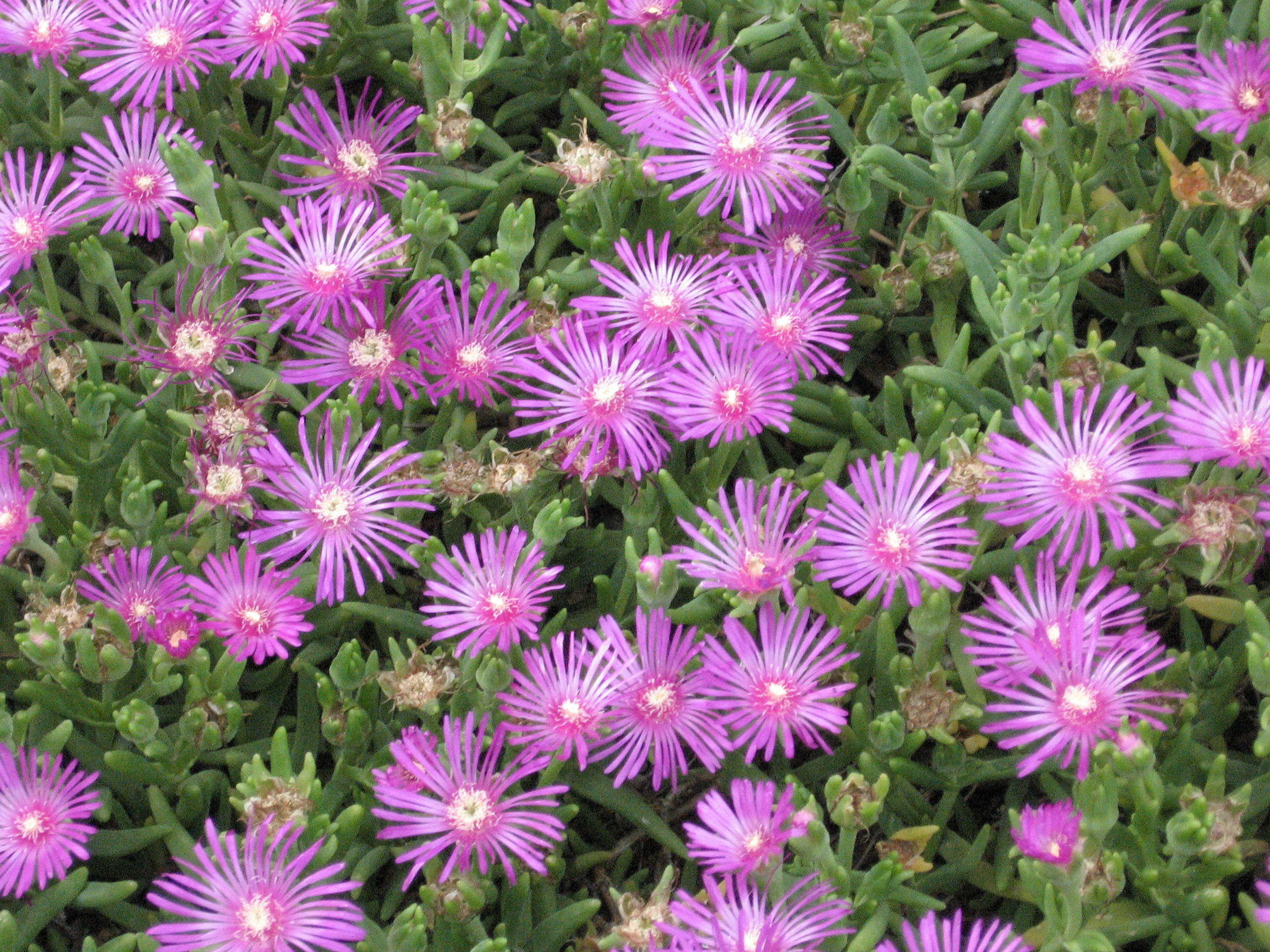 Lampranthus inconspicuus. Real Jardín Botánico, Madrid